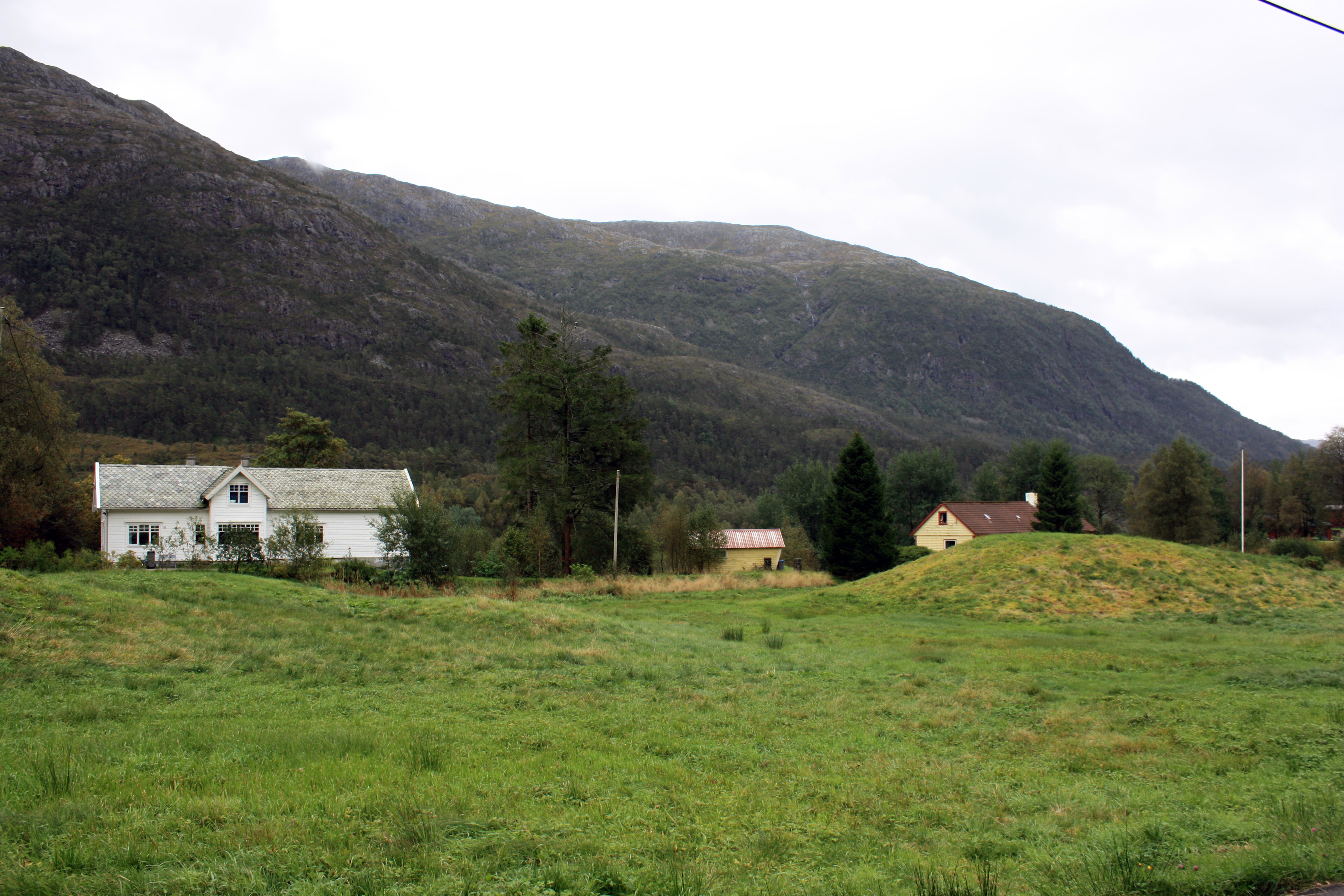 Samdal, Bergen.